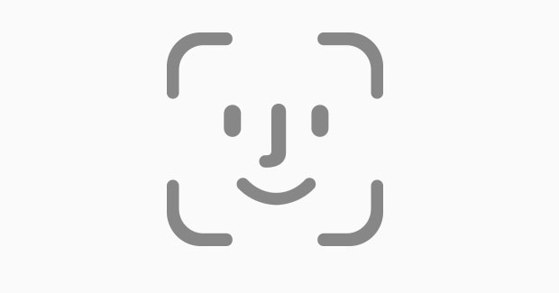 תמונת הלוגו של מערכת זיהוי הפנים - Face ID